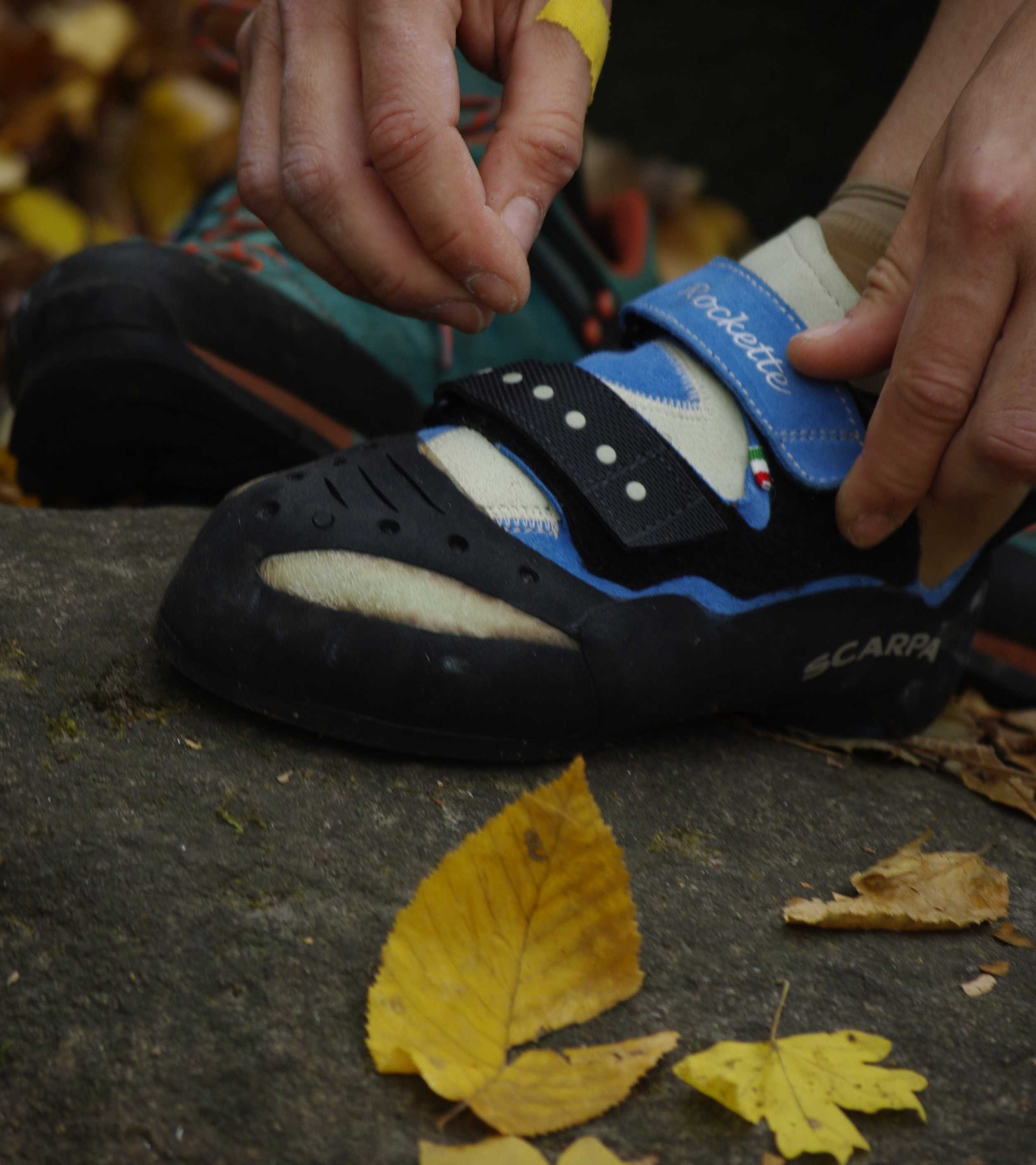 Скельники Scarpa на скелях в Буках.